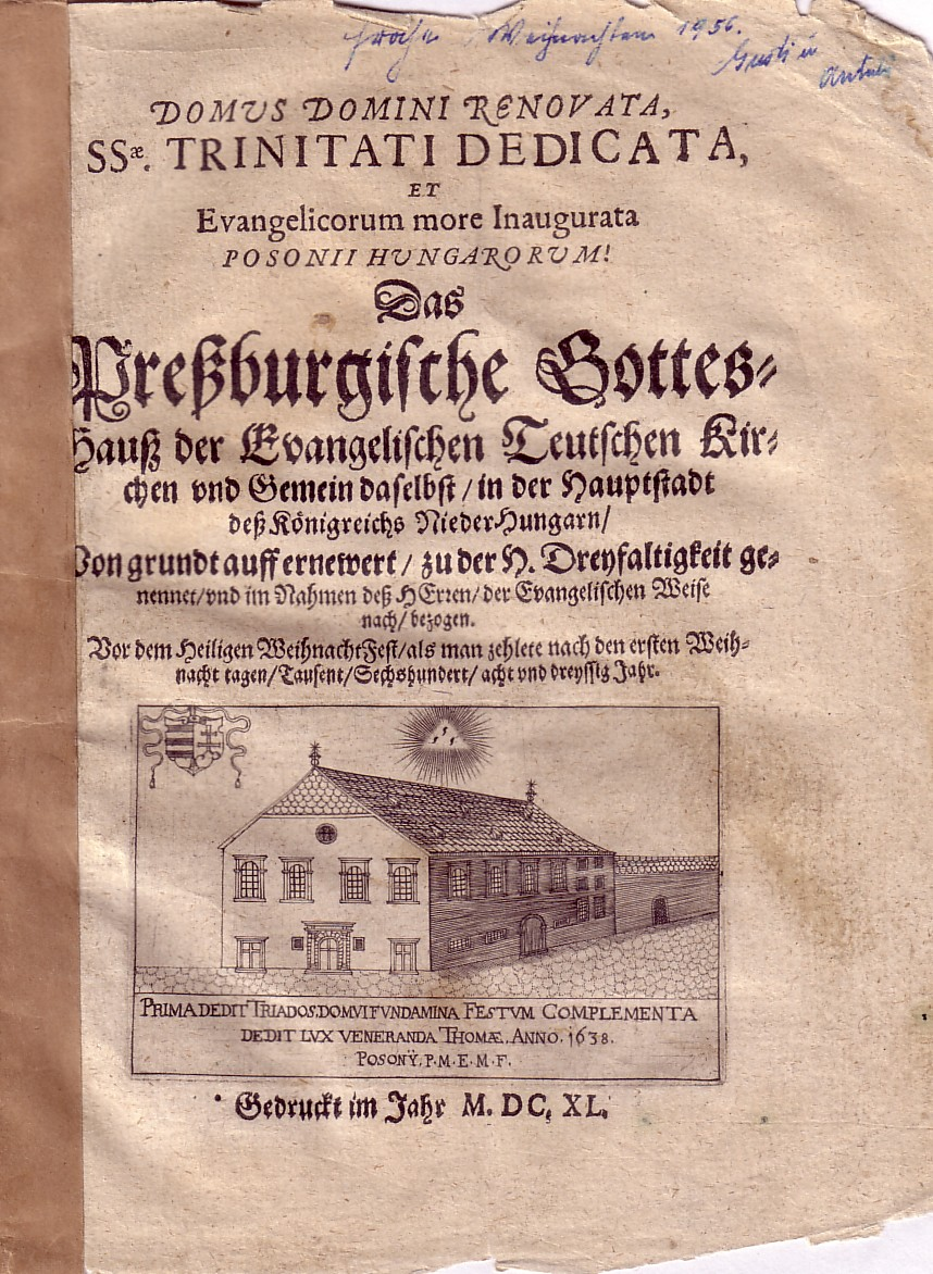 Titelblatt der Festschrift anlässlich der Einweihung der ersten Deutschen ev. Kirche A.B. zu Pressburg. Das Original aus dem Jahre 1640 befindet sich im Archiv des Karpatendeutschen Kulturwerkes (KDKW) in Karlsruhe.